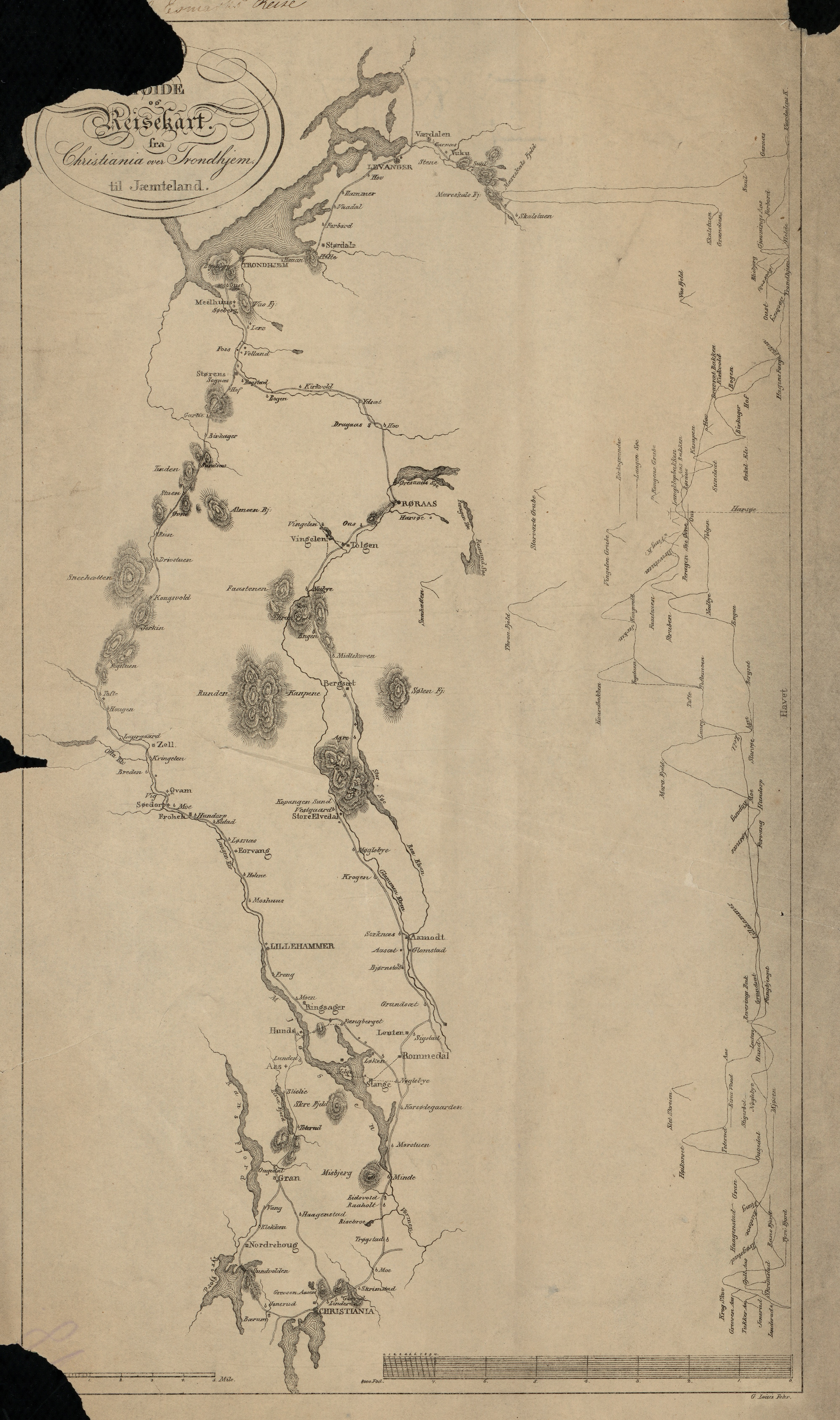 Kart fra Nasjonalbibliotekets kartsamling. Kartet er gitt ut i (1829) og viser Øst-Norge.